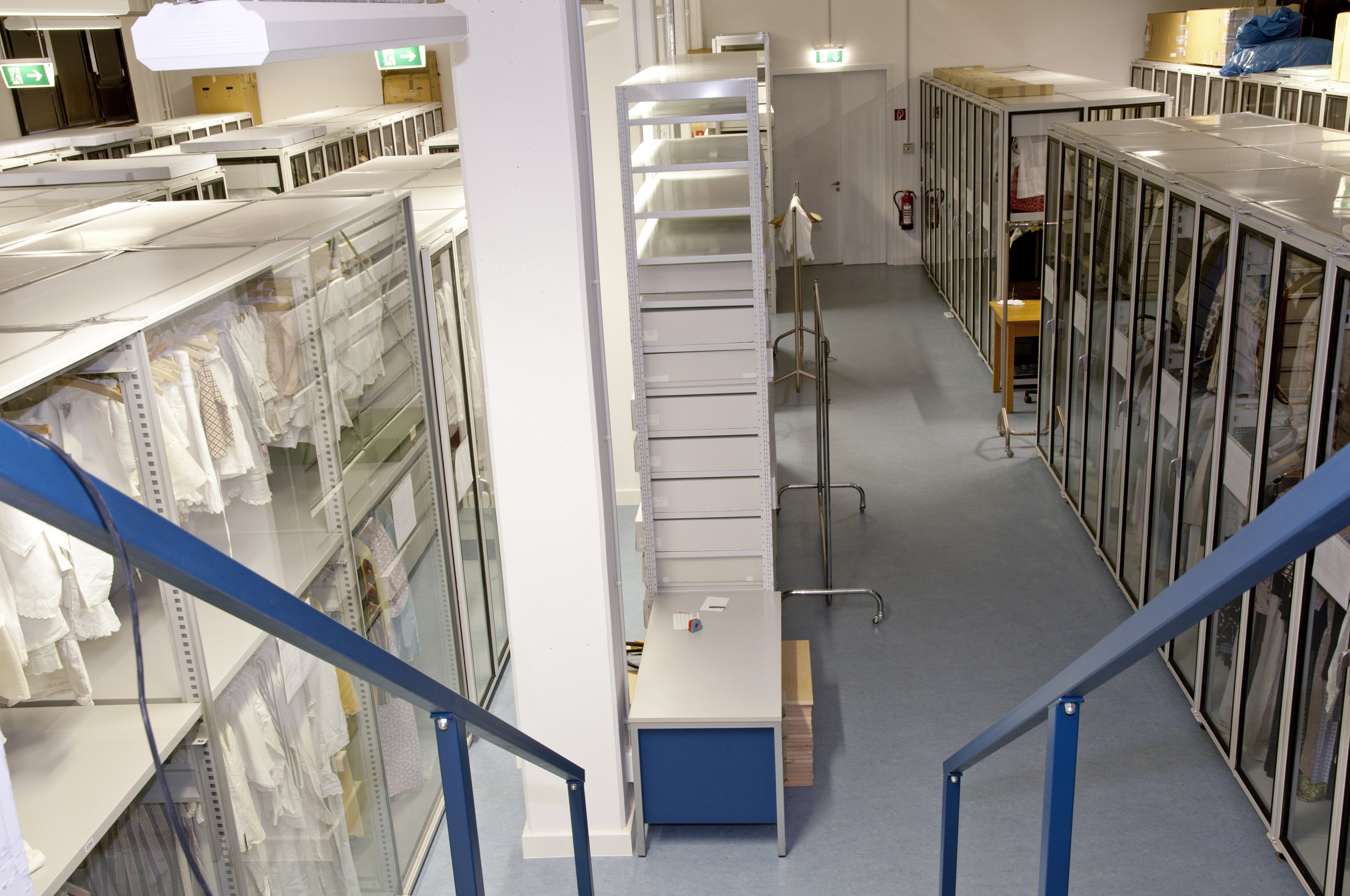 Textildepot des Museums Europäischer Kulturen